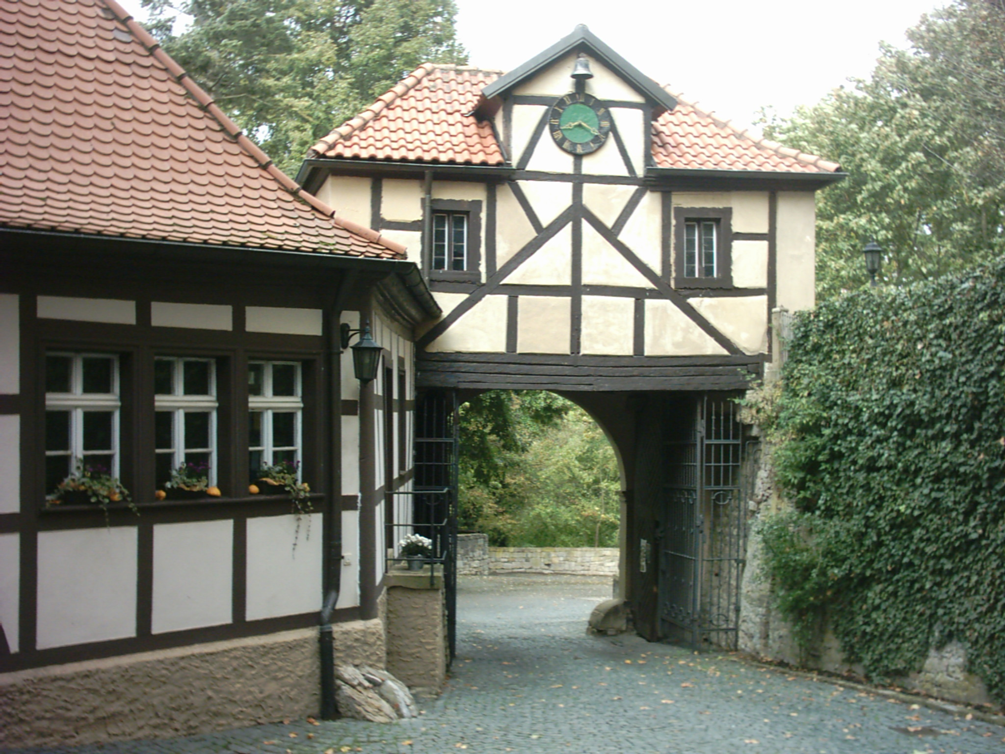 Torhaus Schloss Mainberg, in mainberg einem Ortsteil von Schonungen